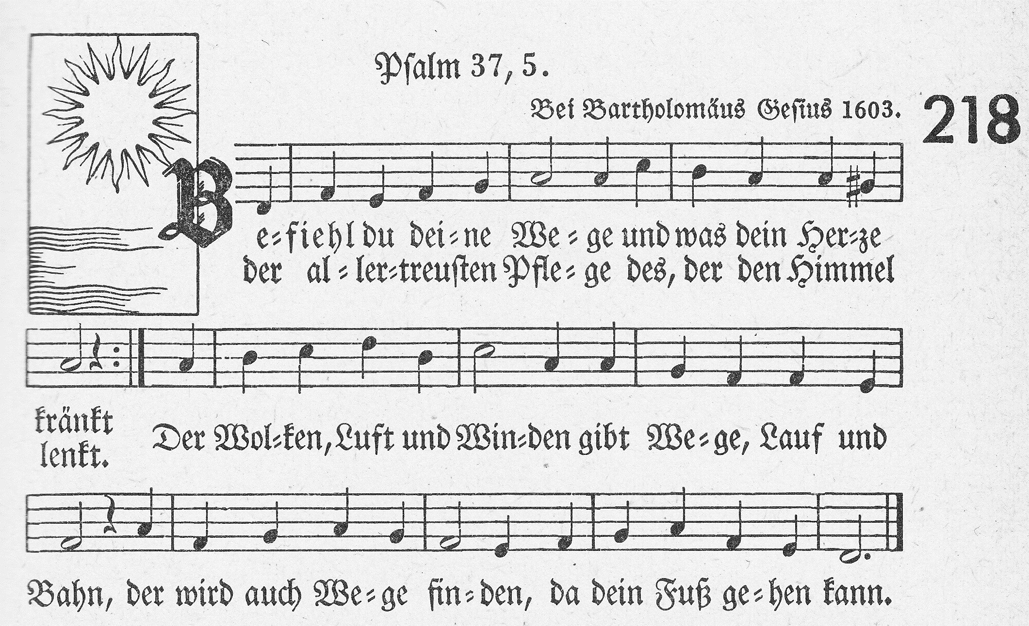 Scan des Liedes aus dem Evangelischen Gesangbuch für Rheinland und Westfalen, hrsg. von der Rheinischen und Westfälischen Synode, mit dem vom Deutschen Evangelischen Kirchenausschuss 1915 beschlossenen Stammteil (Lieder 1-342), gedruckt von Verlag W. Crüwell und in Dortmund 1929 erschienen.